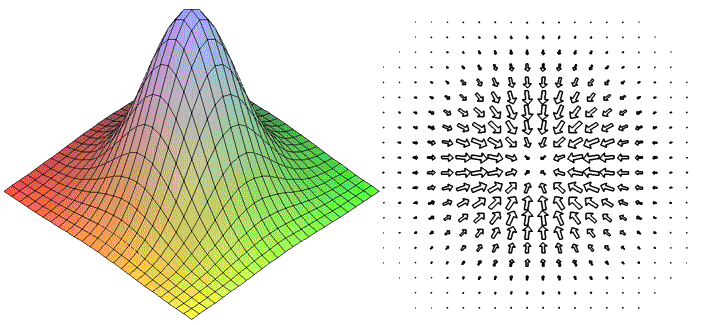 Вот так операция градиента преобразует холм (слева) в поле векторов (справа). Видно, что вектора направлены в горку и тем длиннее, чем круче наклон.